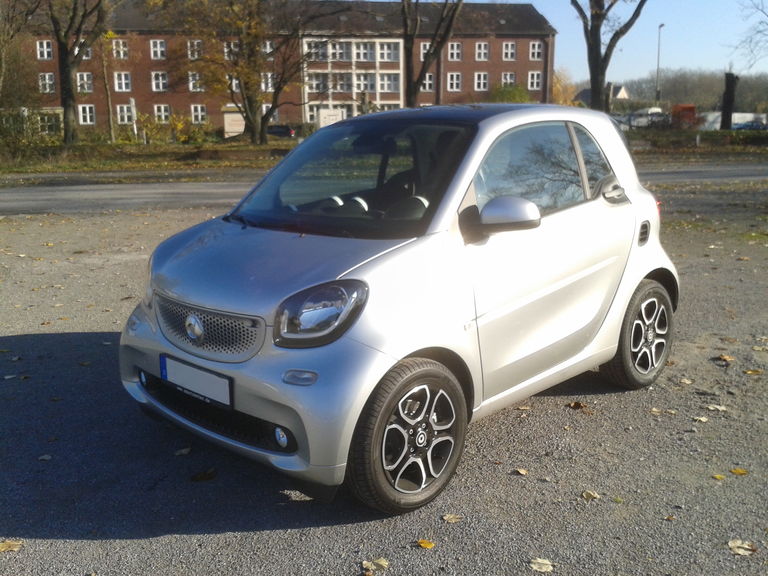 smart fortwo (Baureihe 453), Ausstattungslinie "Prime", 2014